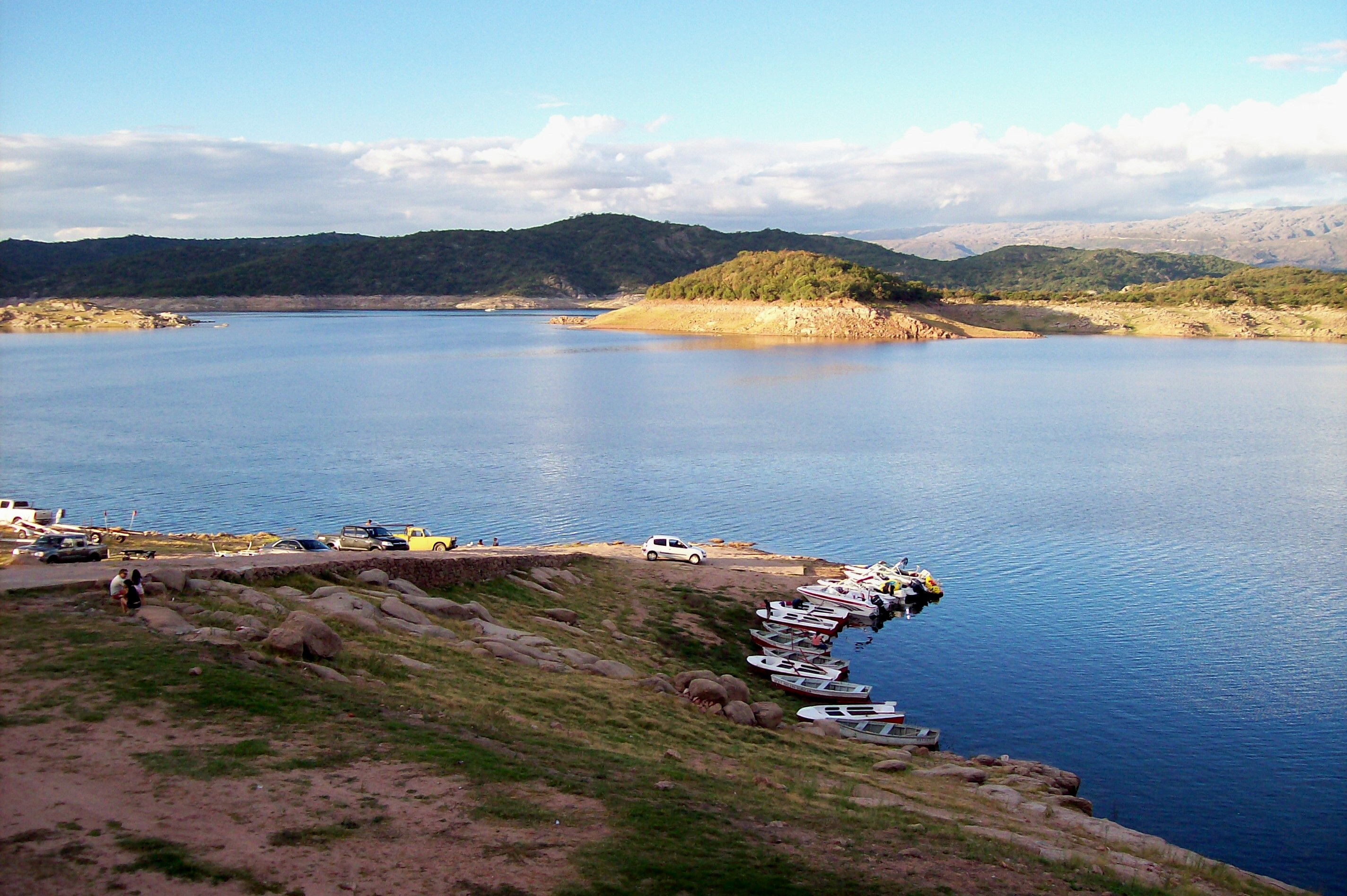 Dique La Viña, en el Río de los Sauces, Las Rabonas, provincia de Córdoba, Argentina.